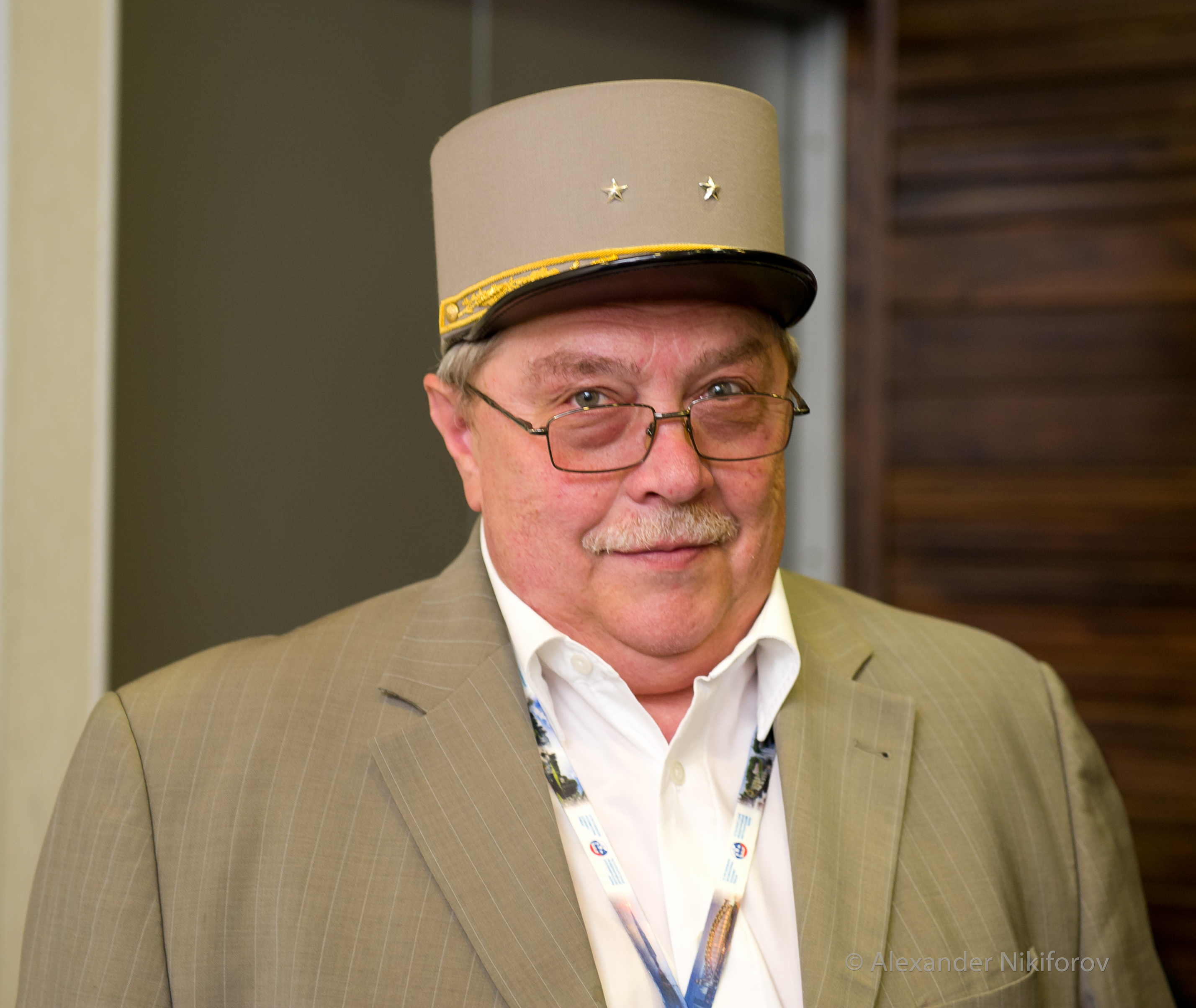 Евгений Александрович Хорошевцев — российский актёр